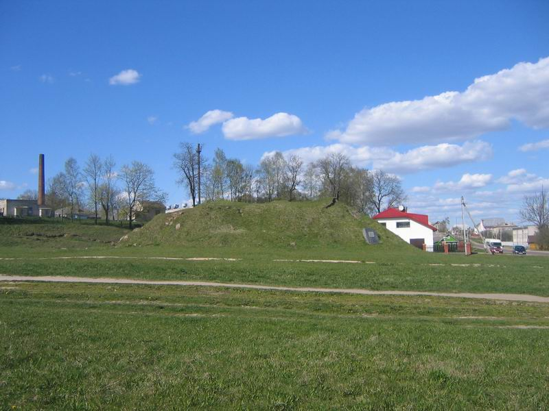 Беларуская (тарашкевіца): Койданаў